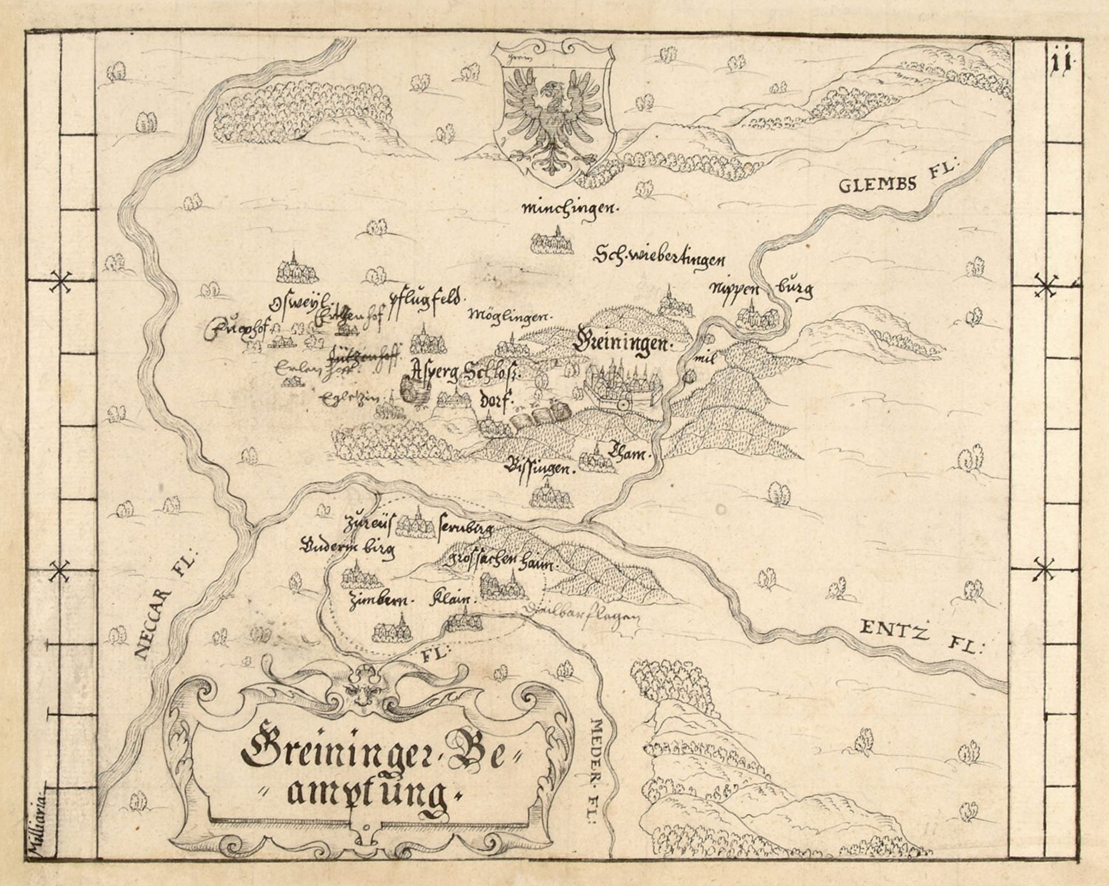 Karte des württembergischen Amts Grüningen (heute Markgröningen) – erweitert um die nach 1561 an Württemberg gefallene Herrschaft Sachsenheim, allerdings noch ohne Sersheim, das 1589 württembergisch wurde. Deshalb erscheint eine Datierung zwischen 1561 und 1589 naheliegender als um 1600 bis 1605, wie meist angenommen. Auch im Vergleich zu Georg Gadners Forstkarten (1590) wirkt diese Beamptungskarte älter. In der nachfolgenden Reinzeichnung, die aus dem Heinrich Schweickher zugeordeten Atlas des Herzogtums Württemberg (1575) stammt, ist Sersheim eingezeichnet.